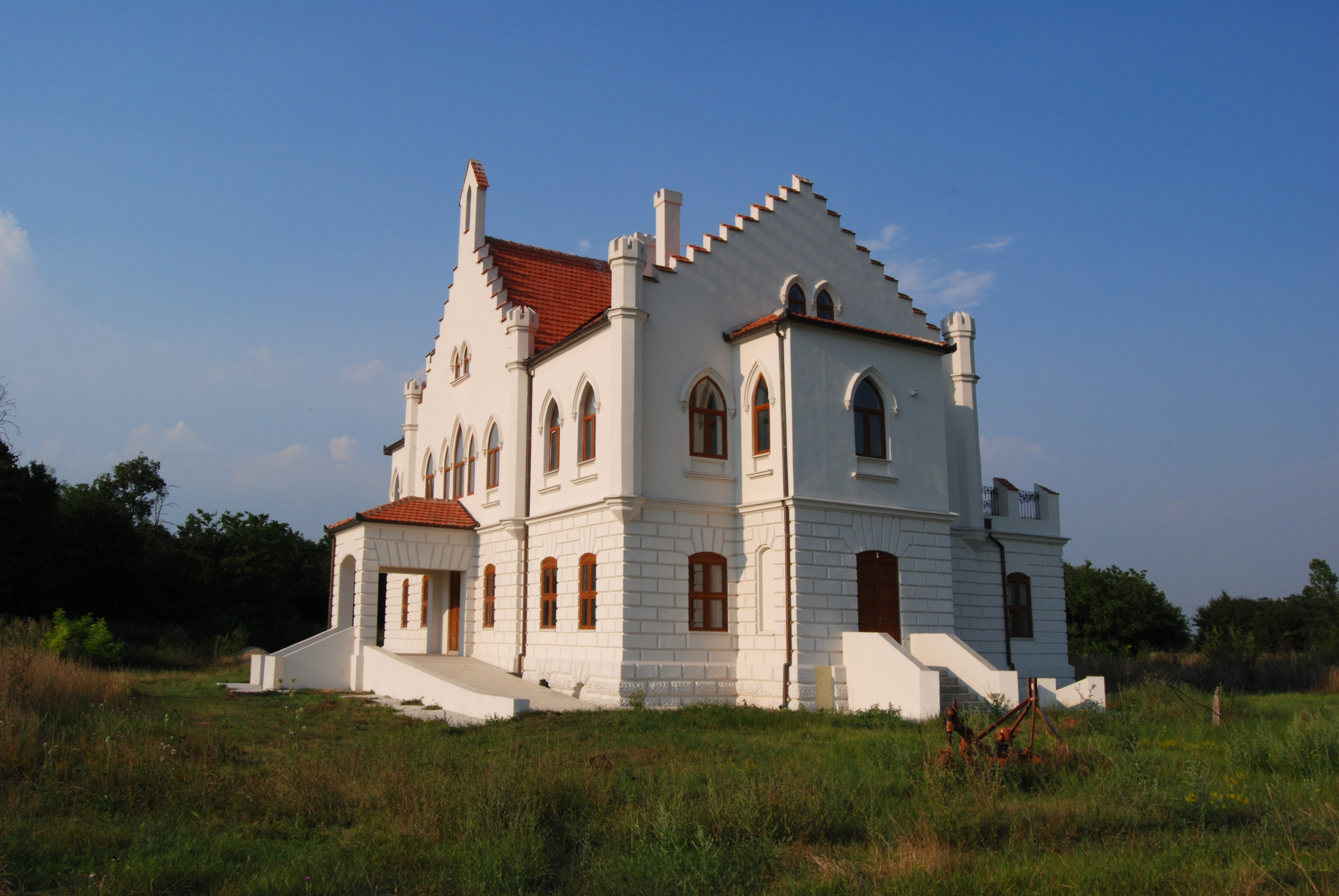 Дворац Капетаново код Старог Леца